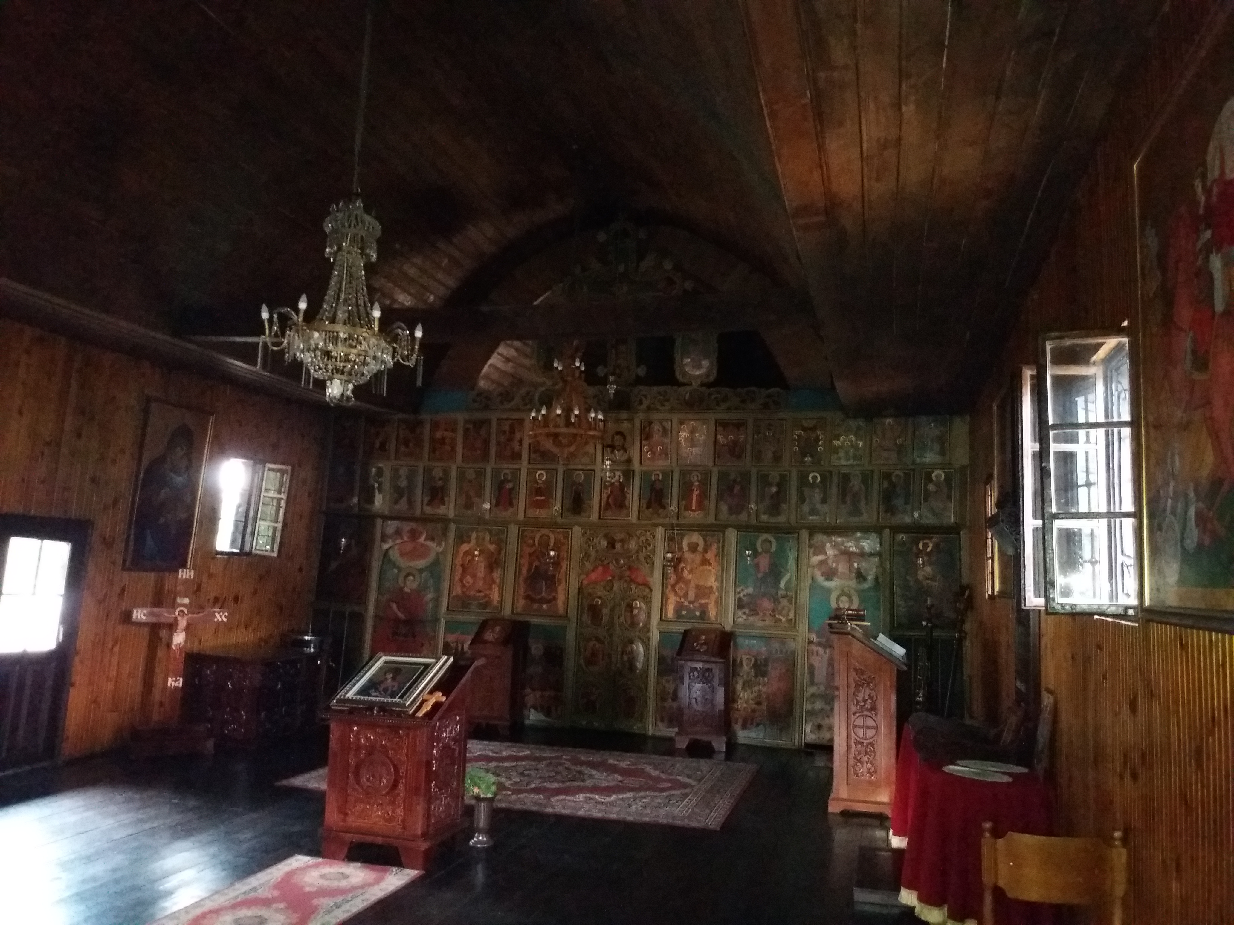 Srpski (latinica): Crkva brvnara Svete Trojice, Selevac